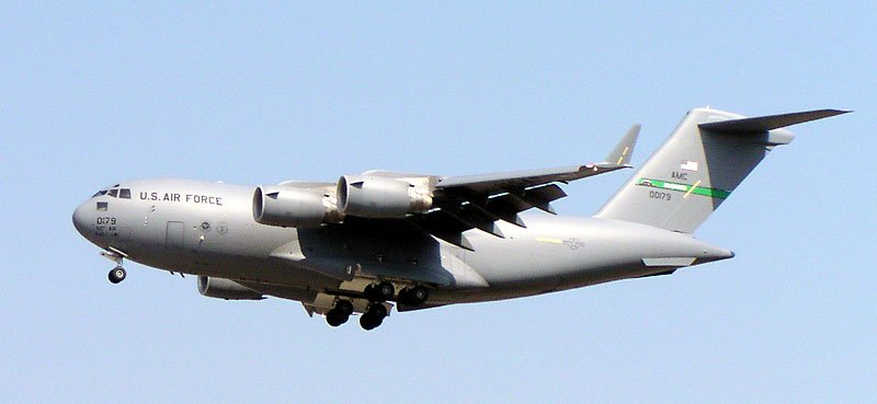 USAF C-17 Globemaster III Beschreibung: Eine C-17 Globemaster III der USAF am 24. April 2003 beim Landeanflug in Frankfurt/Main. Image taken by: Arcturus Licence: GFDL-self + cc-by-sa-2.0-de